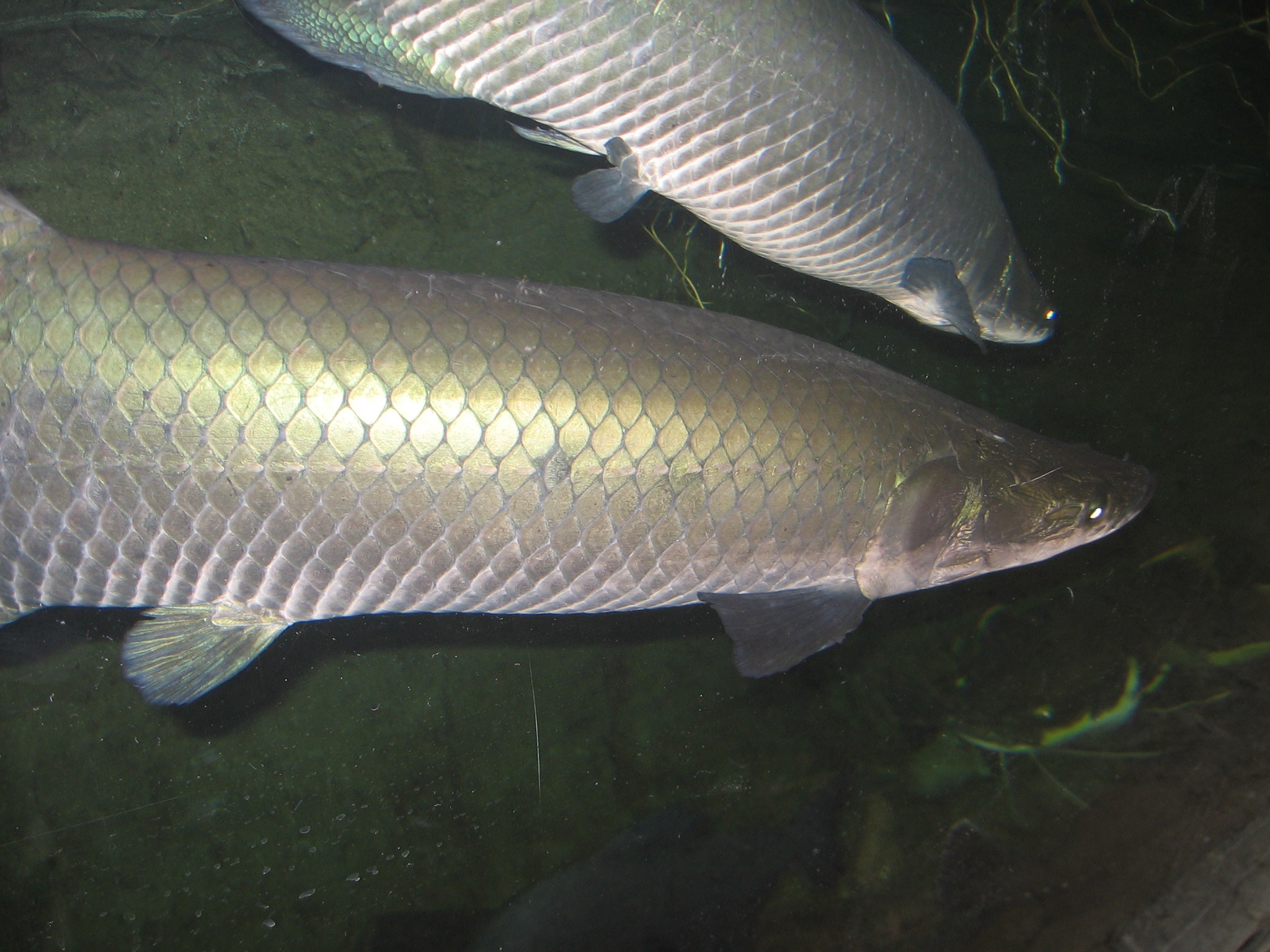 Pirarucu (Arapaima gigas)